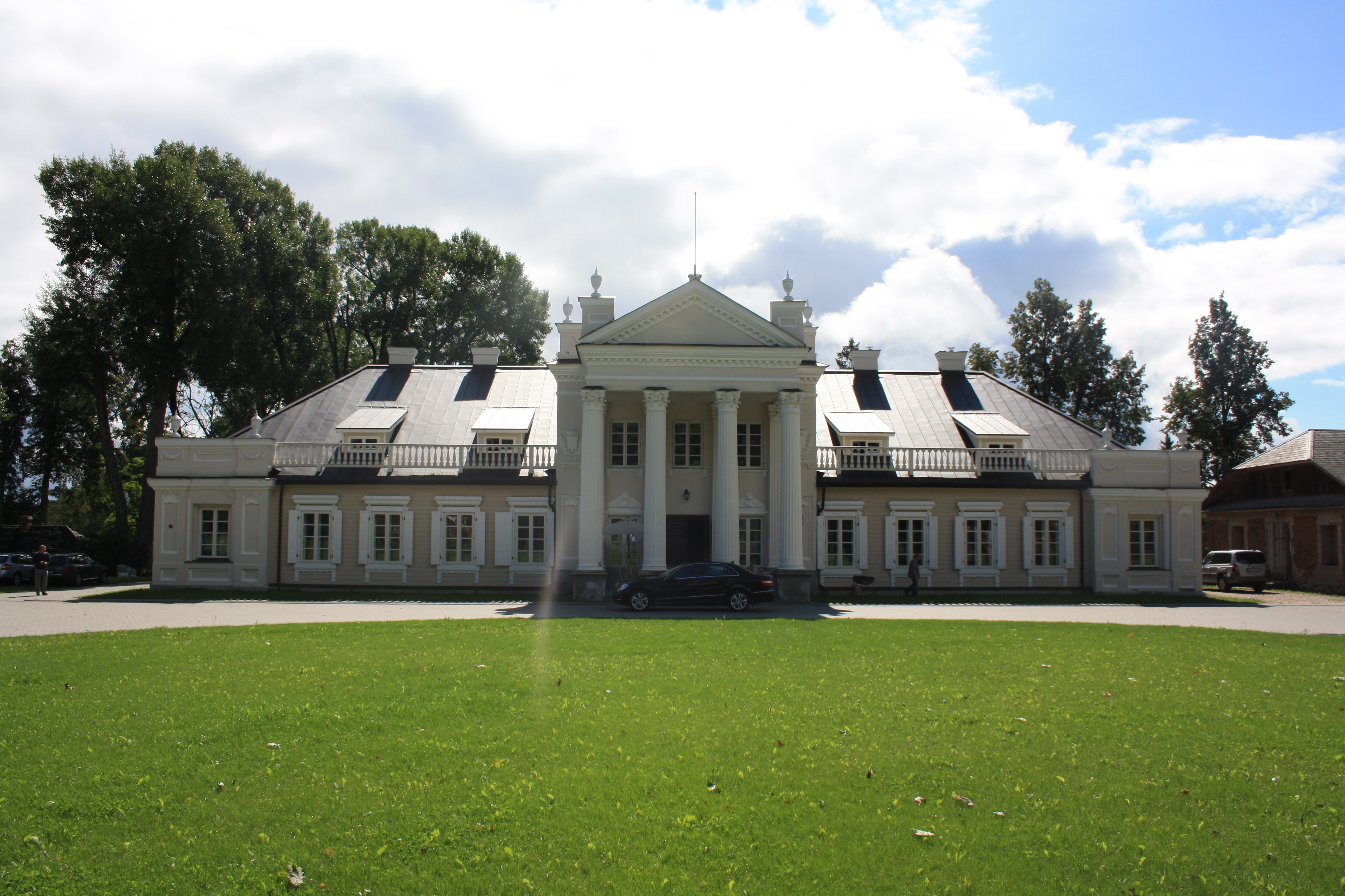 Vidiškių (Ignalinos raj.) dvaras